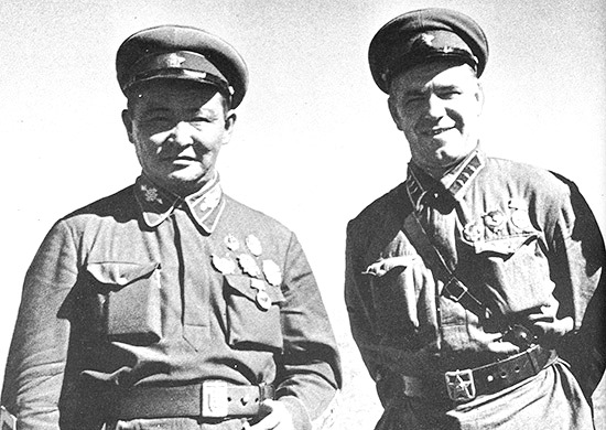 Маршал Х. Чойбалсан и комкор Г. Жуков. Халхин-Гол